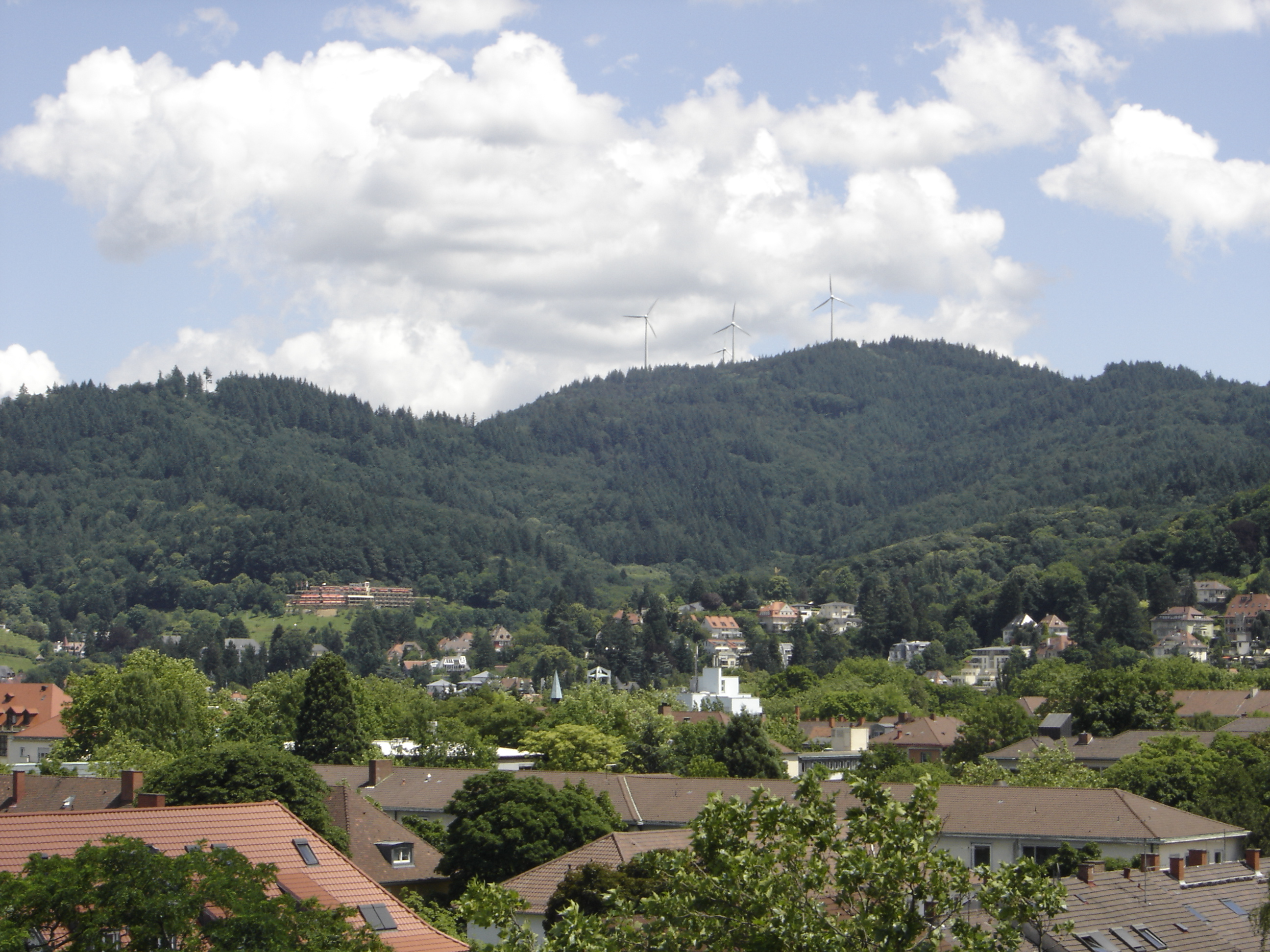 Blick von der Dachterrasse des Rektorats der Uni Freiburg am Fahnenbergplatz zum Rosskopf